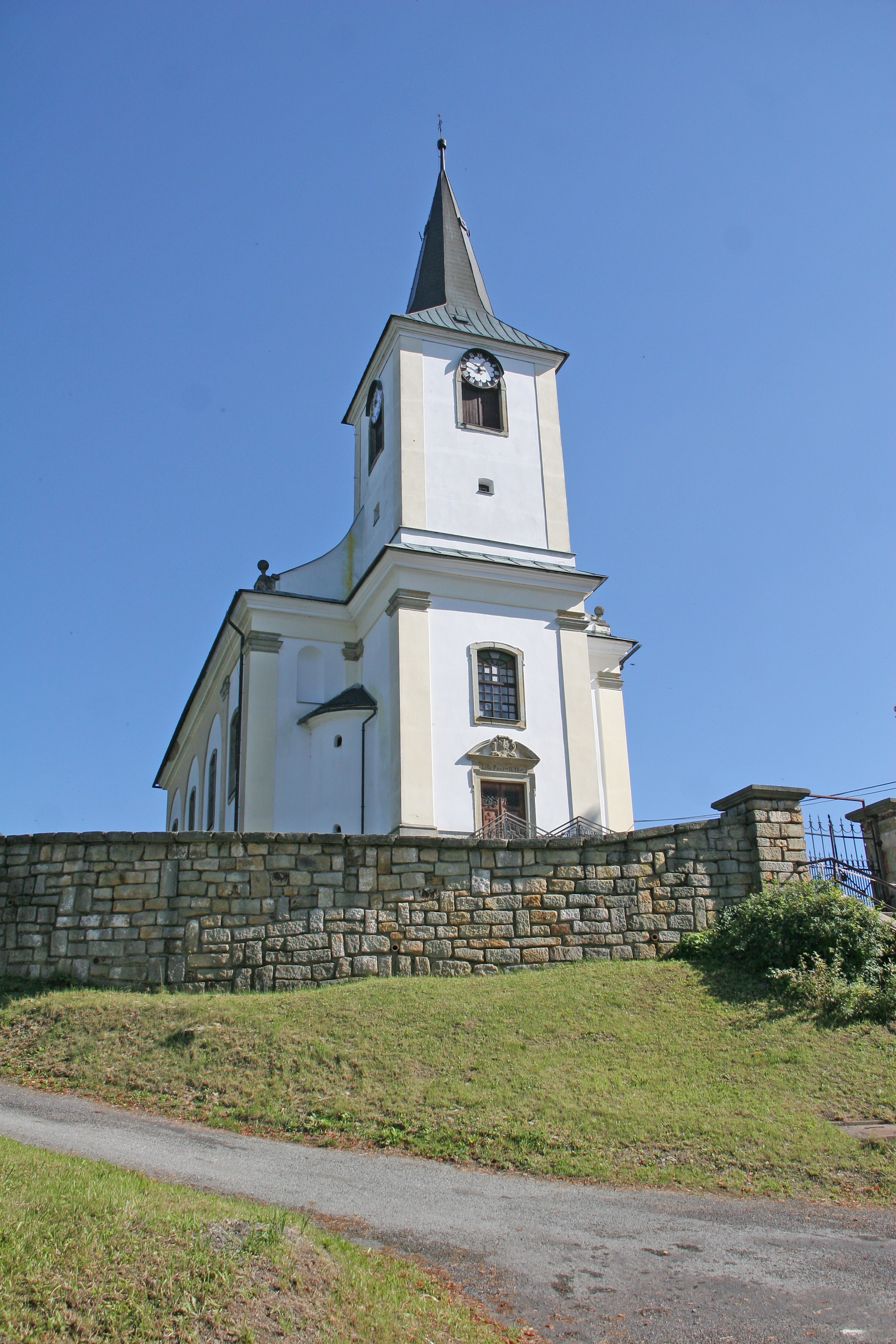 Kostel svatého Mikuláše, Nekoř.